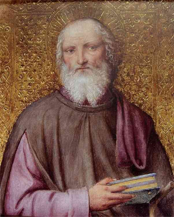 San Gerardo dei Tintori patrono della città di Monza con San Giovanni Battista